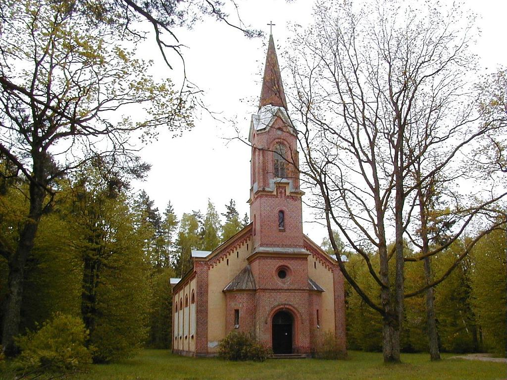 Salas Sv. Jāņa ev. lut. baznīca. 2001-05-13